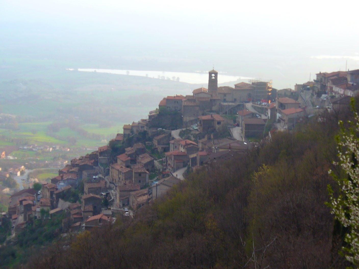 Poggio Bustone (RI) visto dal Santuario francescano.